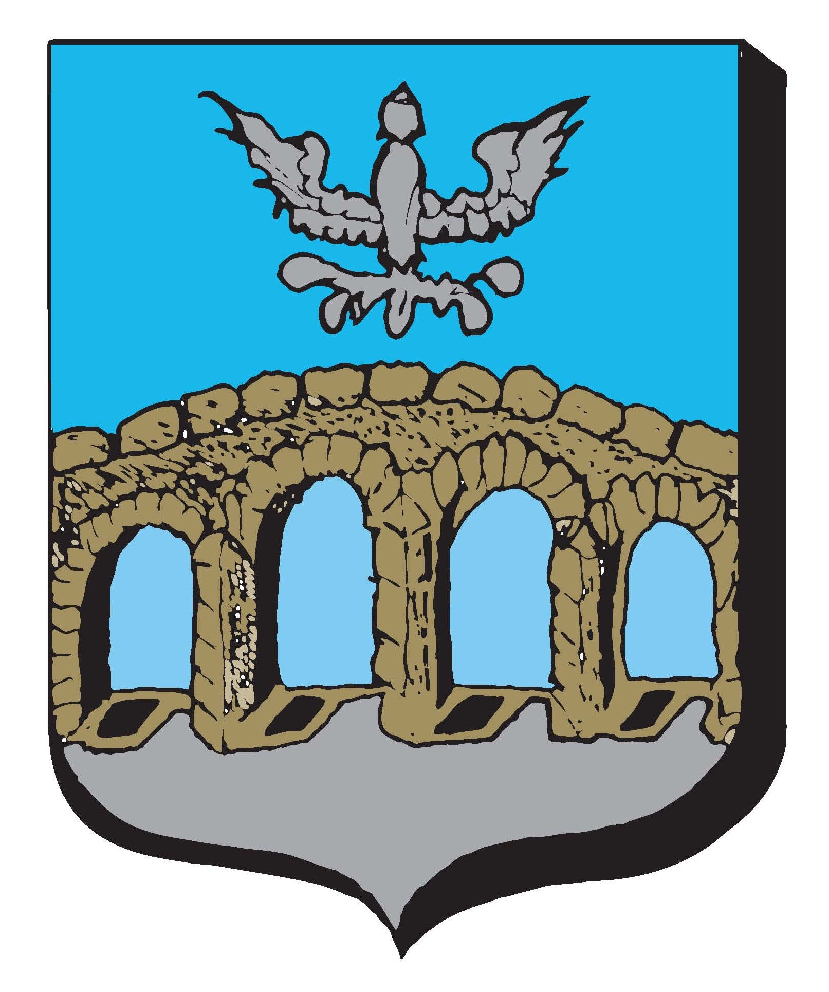 BLASON DE LA VILLE D'ARCHES